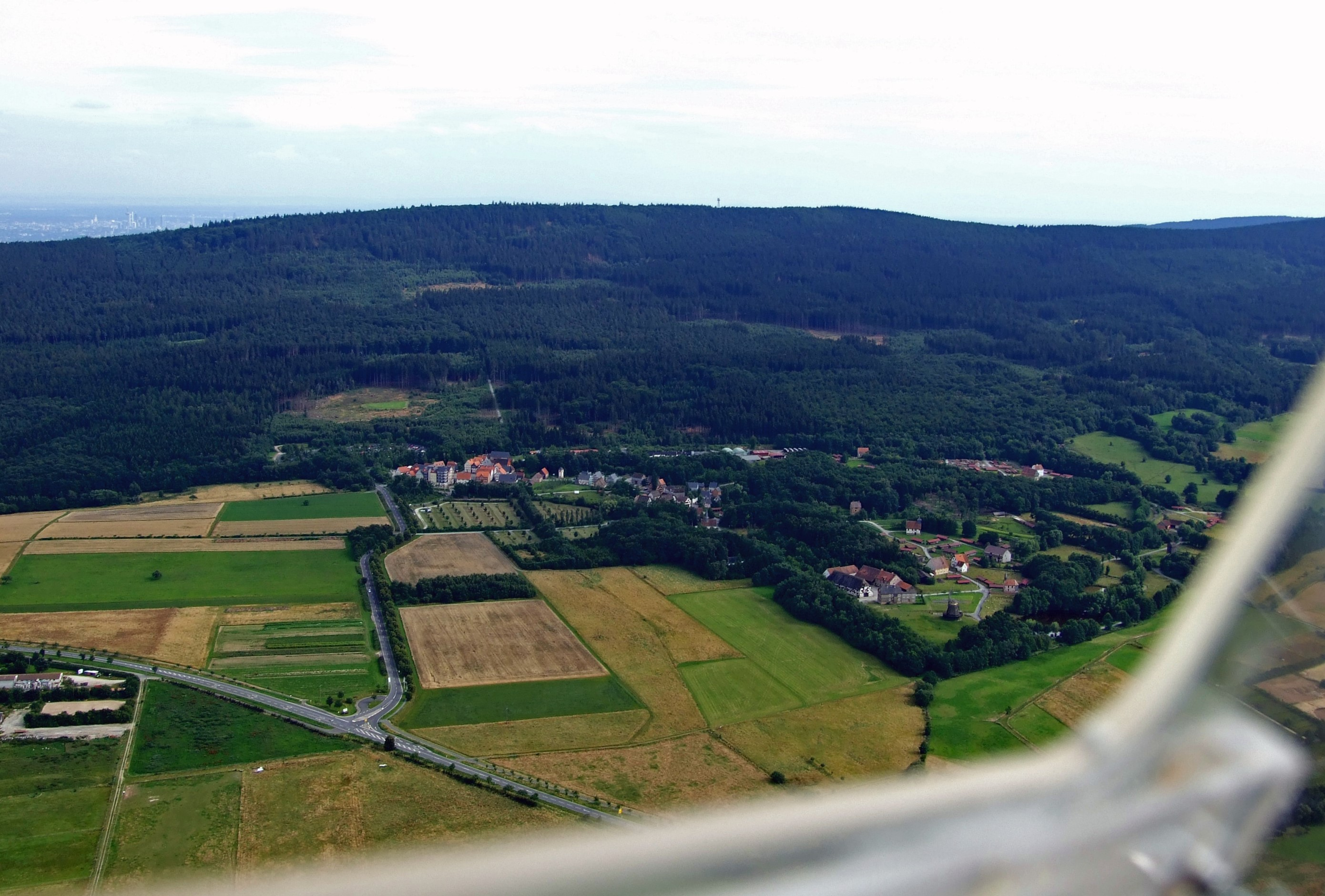 Hessenpark bei Neu Anspach im Taunus